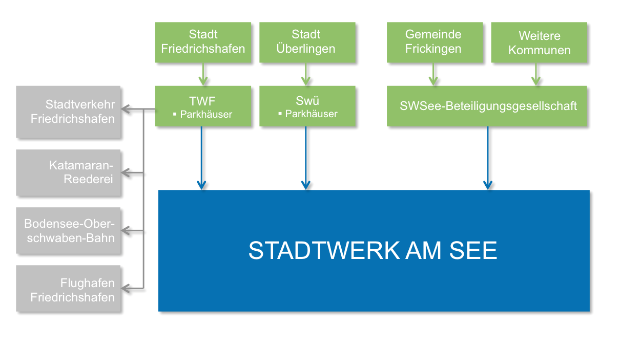 Gesellschafterstruktur Stadtwerk am See